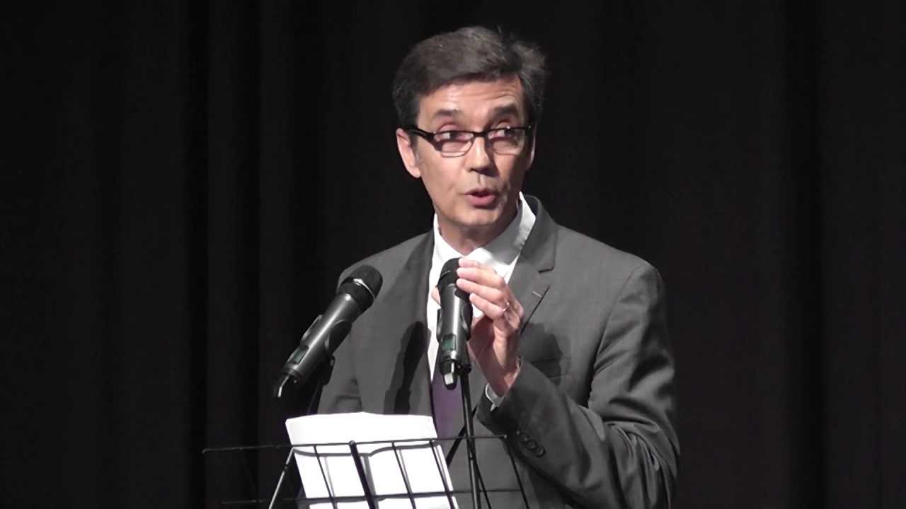 Le proviseur Joël Bianco lors d'un discours